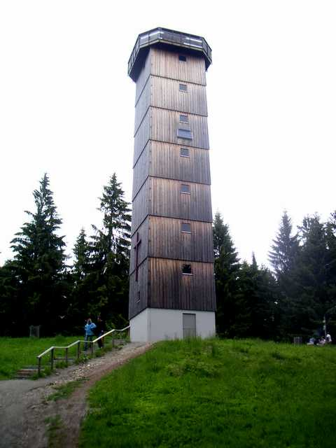 Gipfel des Schwarzen Grates in Isny (Allg)